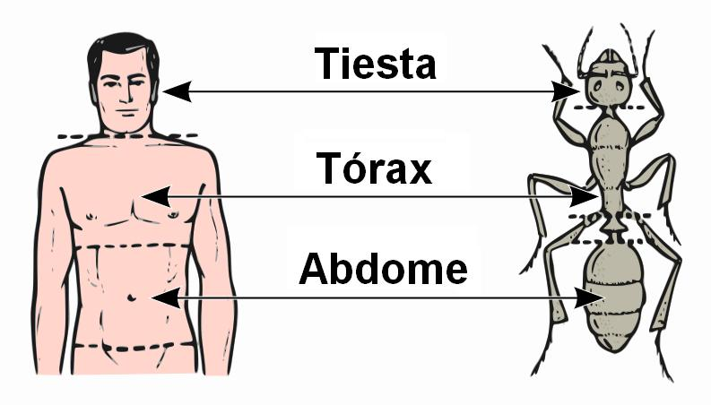 tiesta torax abdome